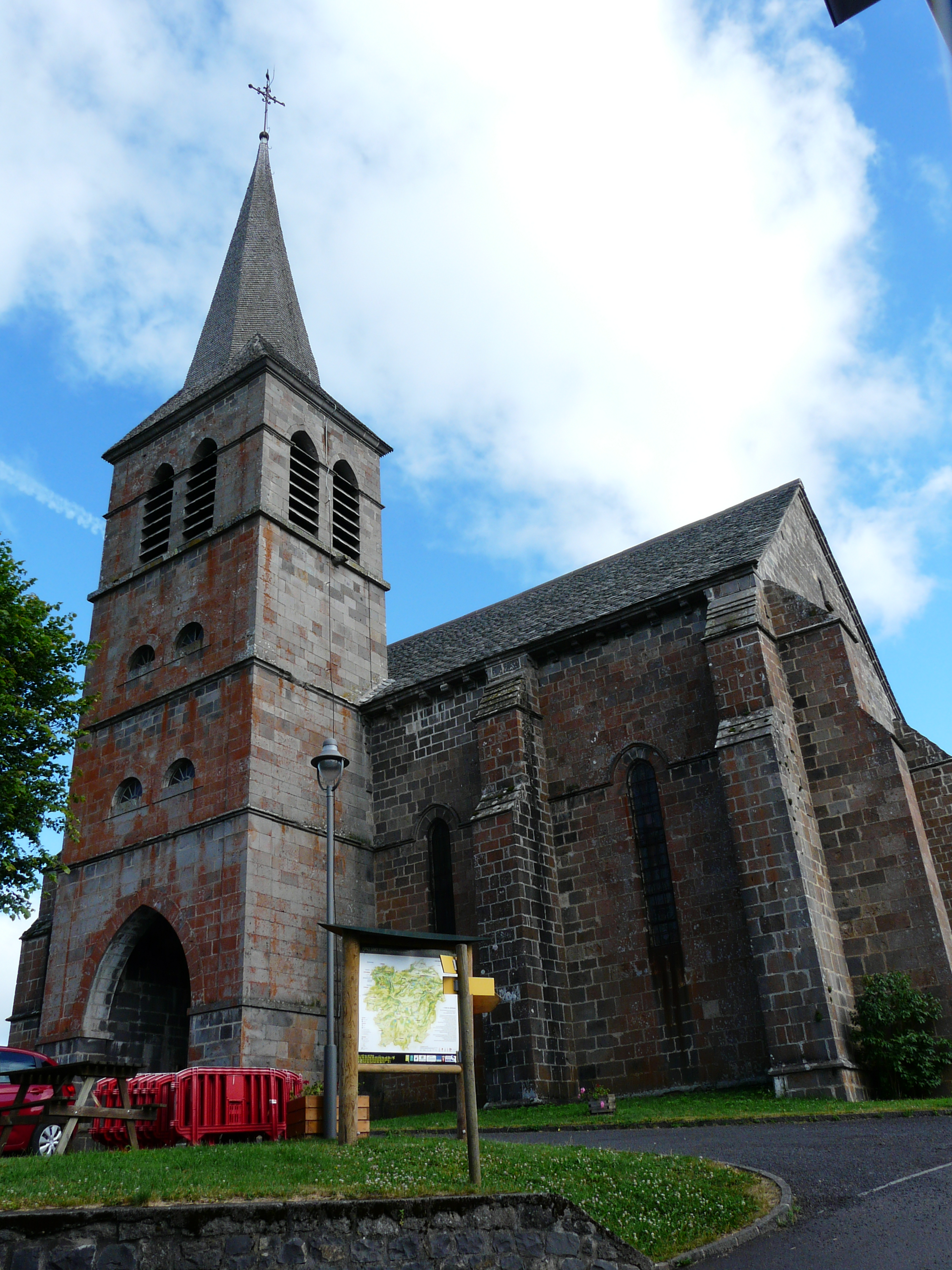 L'église Saint-Bonnet de Chastreix vue du sud-est, Puy-de-Dôme, France.